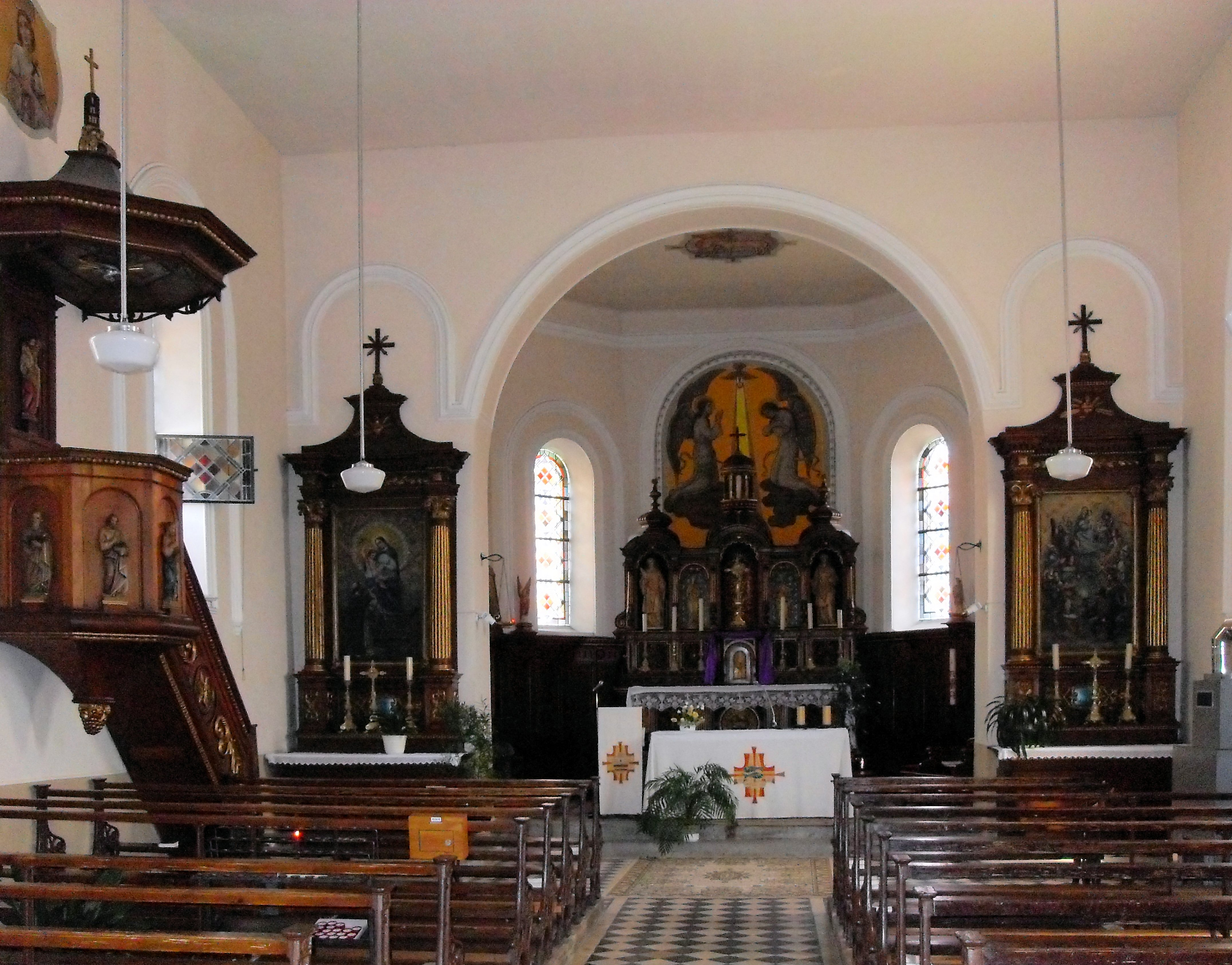 L'intérieur d'église Saint-Laurent à Goldbach-Altenbach